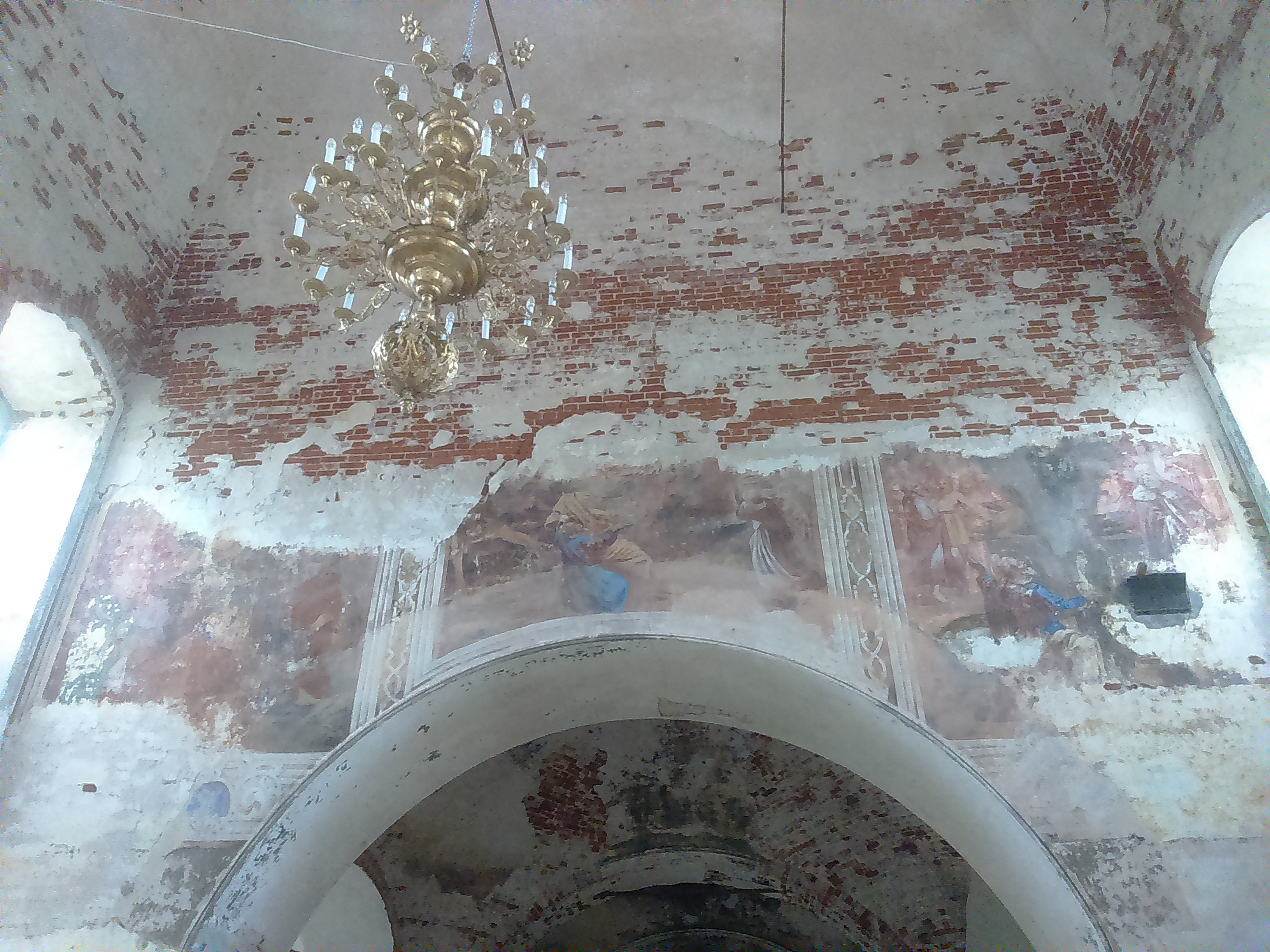 Сохранившаяся роспись была она не яркой, сдержанной, но содержательной и удивительно тонко написанной, с большим чувством, которое легко ощущается даже сейчас через просматривающиеся фрагменты